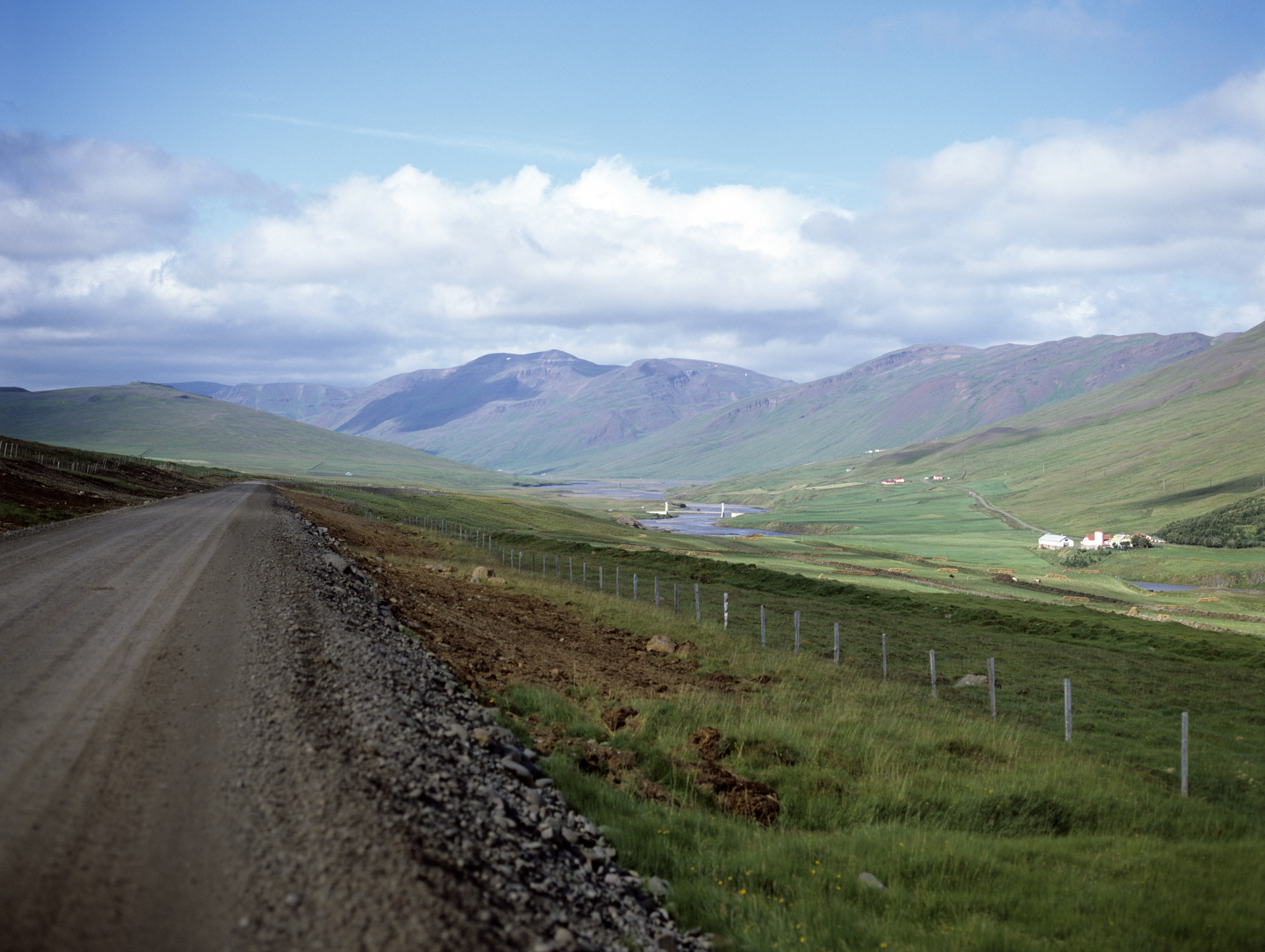 Blöndudalur, eine Verlängerung von Langidalur südlich von Blönduós.